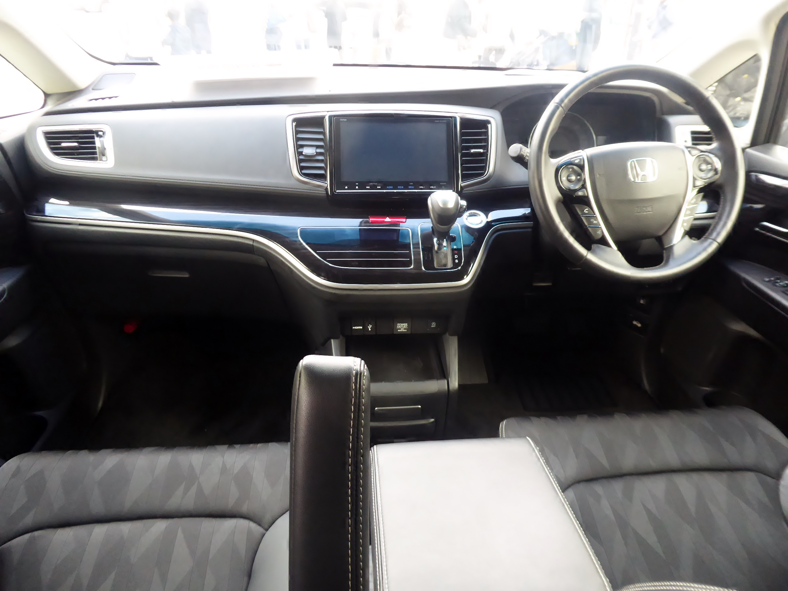 DBA-RC1型ホンダ・オデッセイABSOLUTE・EX Honda SENSINGのインテリアを撮影。